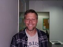 אמנון וולף 2017